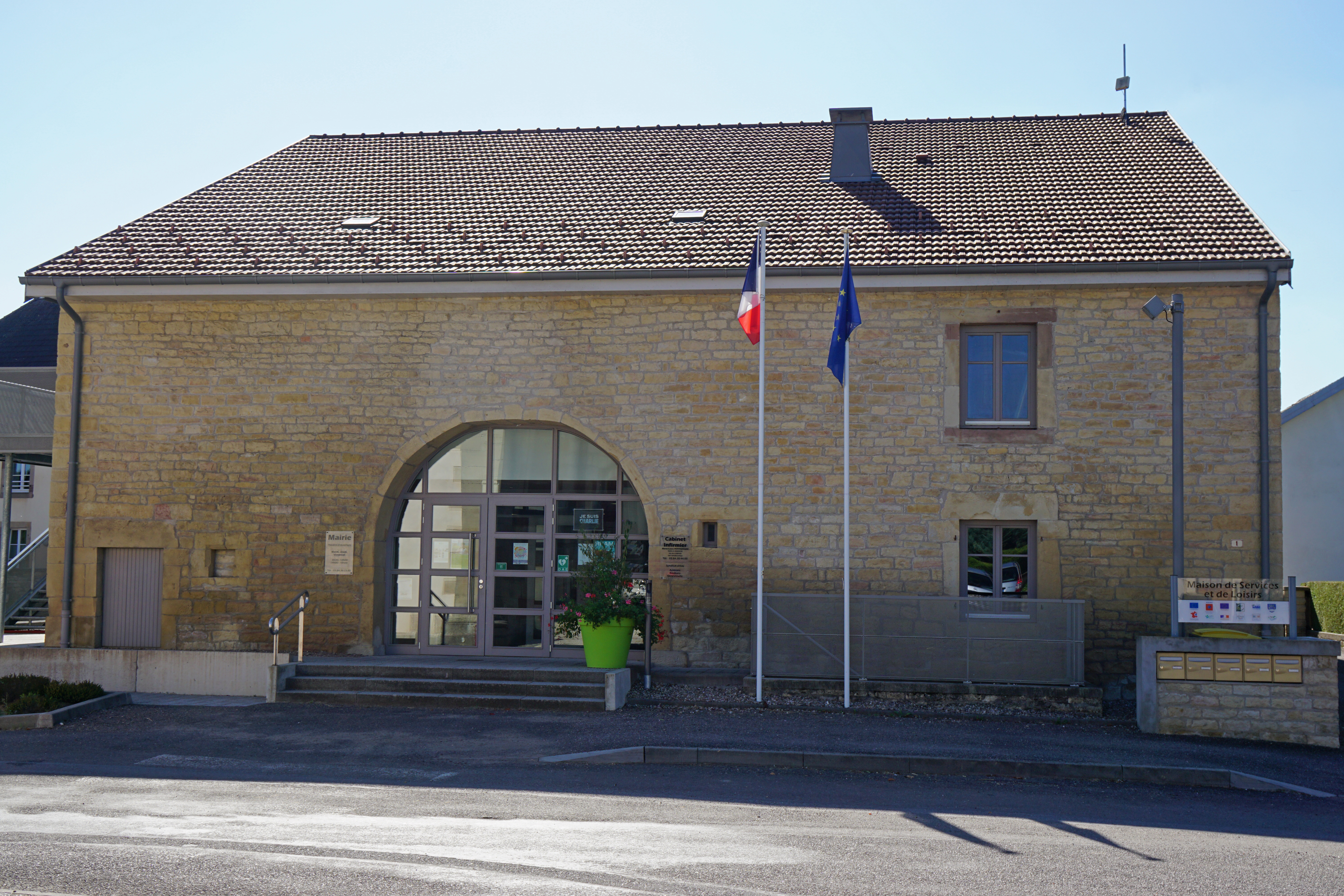 Mairie, maison de services, centre culturel et sportif d'Amblans-et-Velotte.